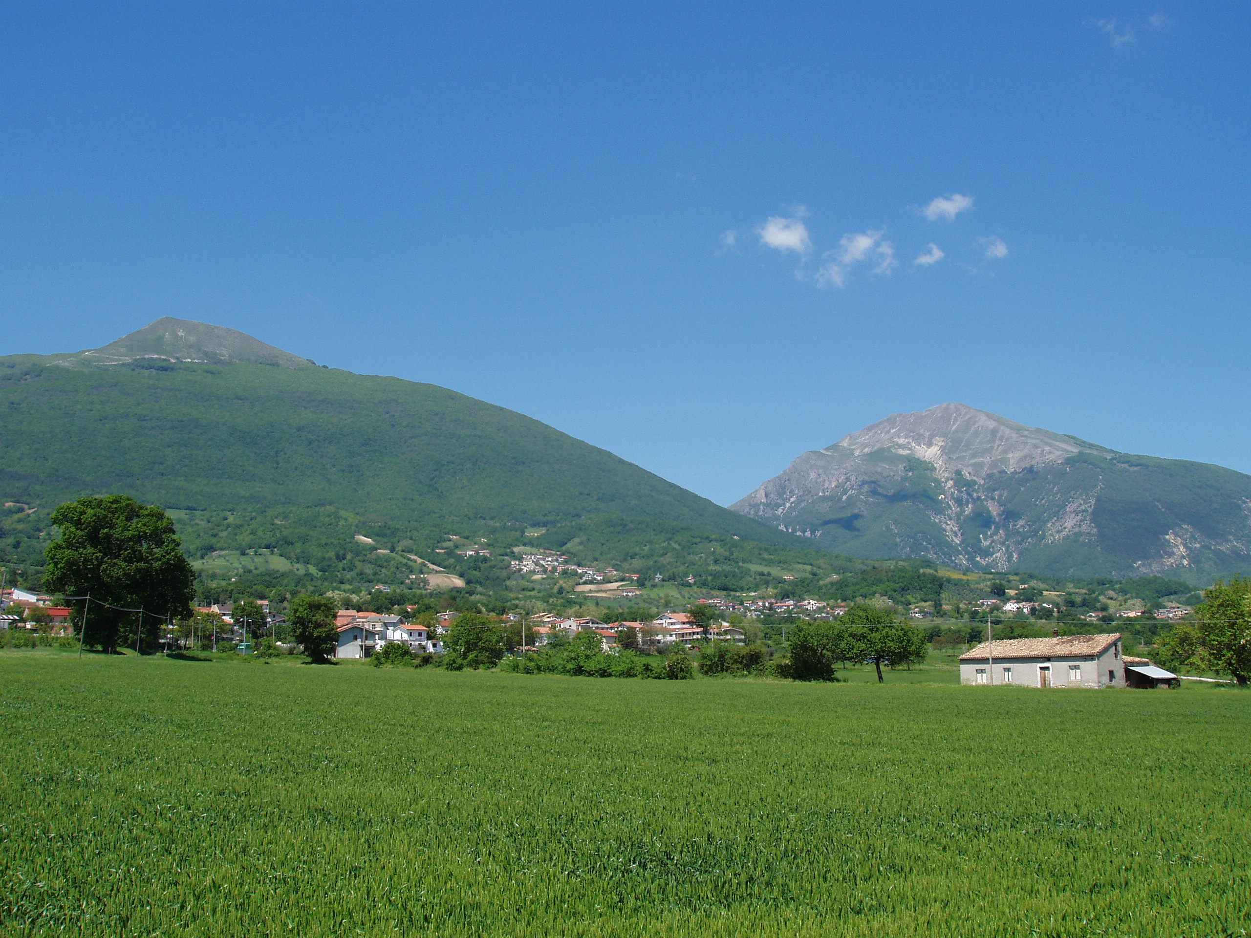 Lucio De Marcellis, I Monti Gemelli, foto personale, GFDL e Creative Commons CC-BY-SA tutte le versioni (3.0, 2.5, 2.0 e 1.0)